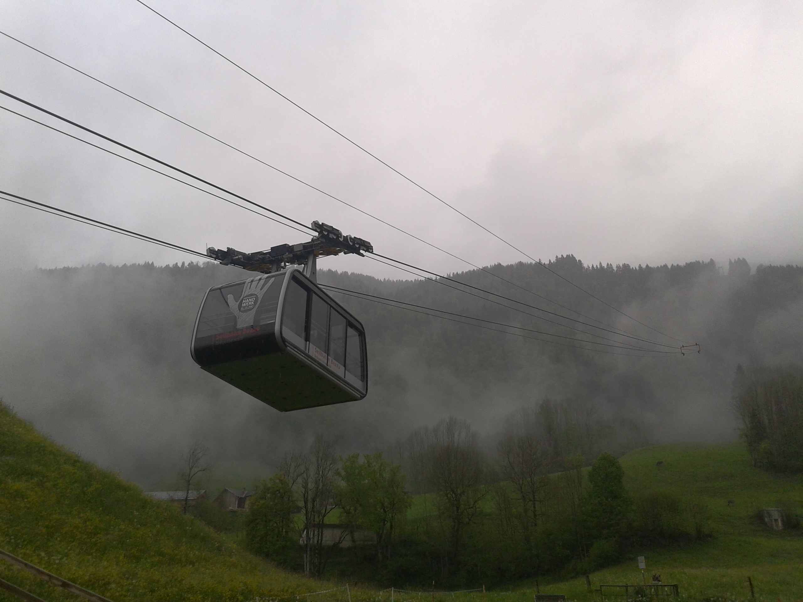 Bezauer Seilbahn (Funifor), Bezau. Erste Fahrt am Morgen (Kontrollfahrt)